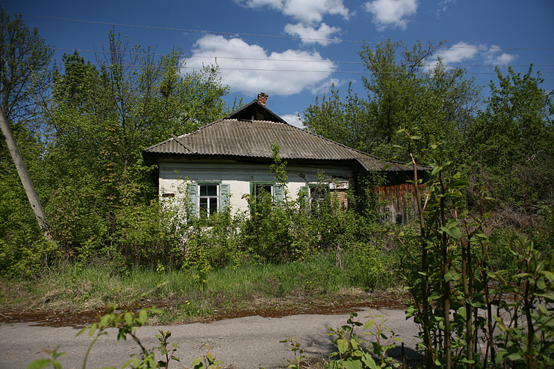 Дом Голубчика на улице Ленина